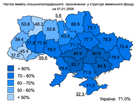 Land for agricultural purposes 2008: Частка земель сільськогосподарського призначення у 2008 році